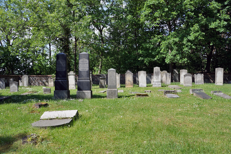 Jüdischer Friedhof Storkow